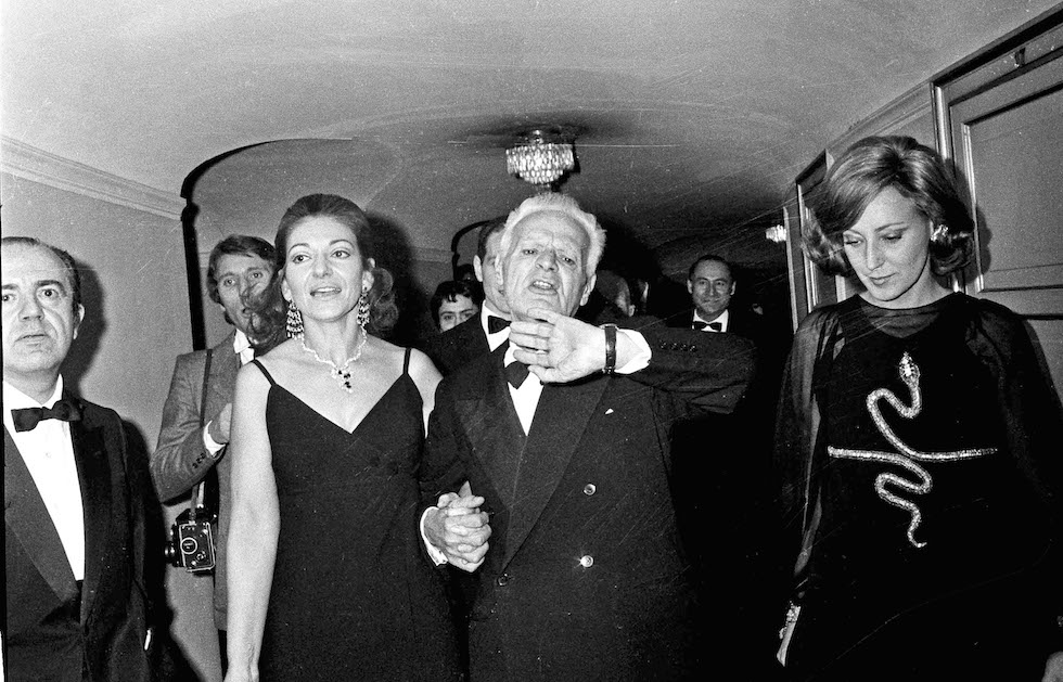 Milano, Teatro alla Scala, 7 dicembre 1970. La cantante d'opera Maria Callas e Antonio Ghiringhelli, sovrintendente del teatro milanese, alla prima stagionale 1970-71 (I vespri siciliani di Giuseppe Verdi, diretta da Gianandrea Gavazzeni).